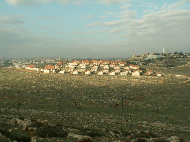 בית חגי. צולם מגבעת רחבעם.